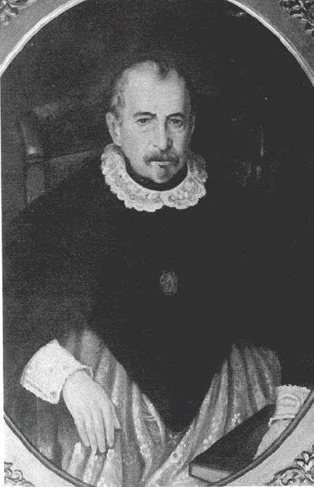 Juan Francisco Meneses (1785 – 1860) político y sacerdote chileno